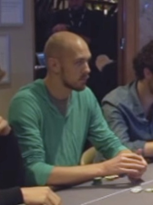 Stephen Chidwick beim Season 2 WPT Alpha8 London